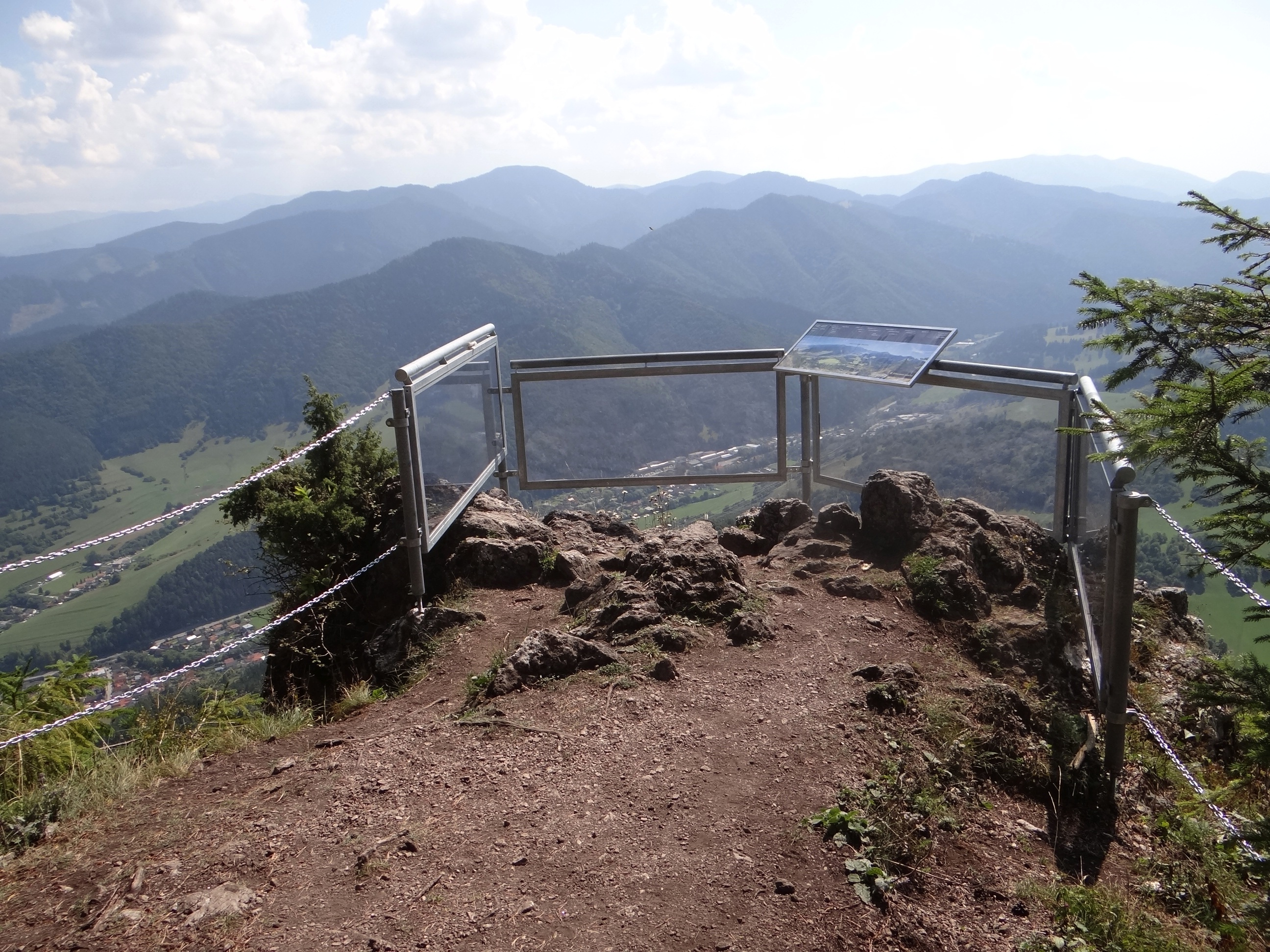 Sidorovo